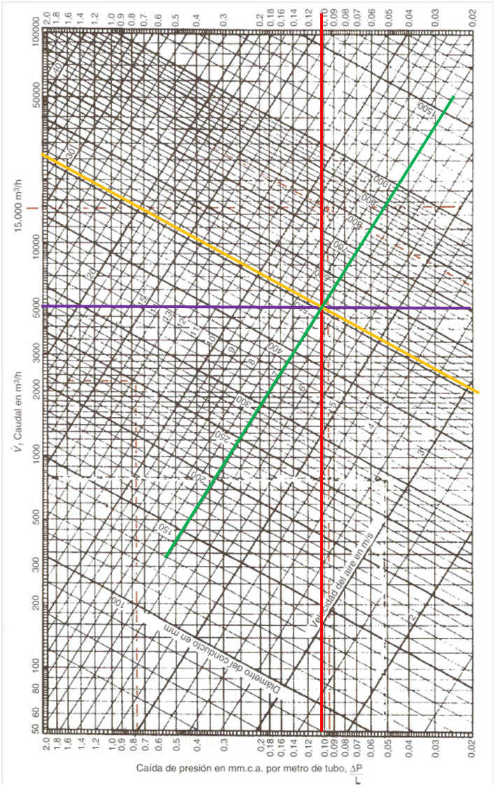 nomograma para Fibra de vidrio. Ejemplo: 7.000 m3/h. 0,1 mm.c.a. = 1Pa . 4,9 m/s. D_H= 300 mm